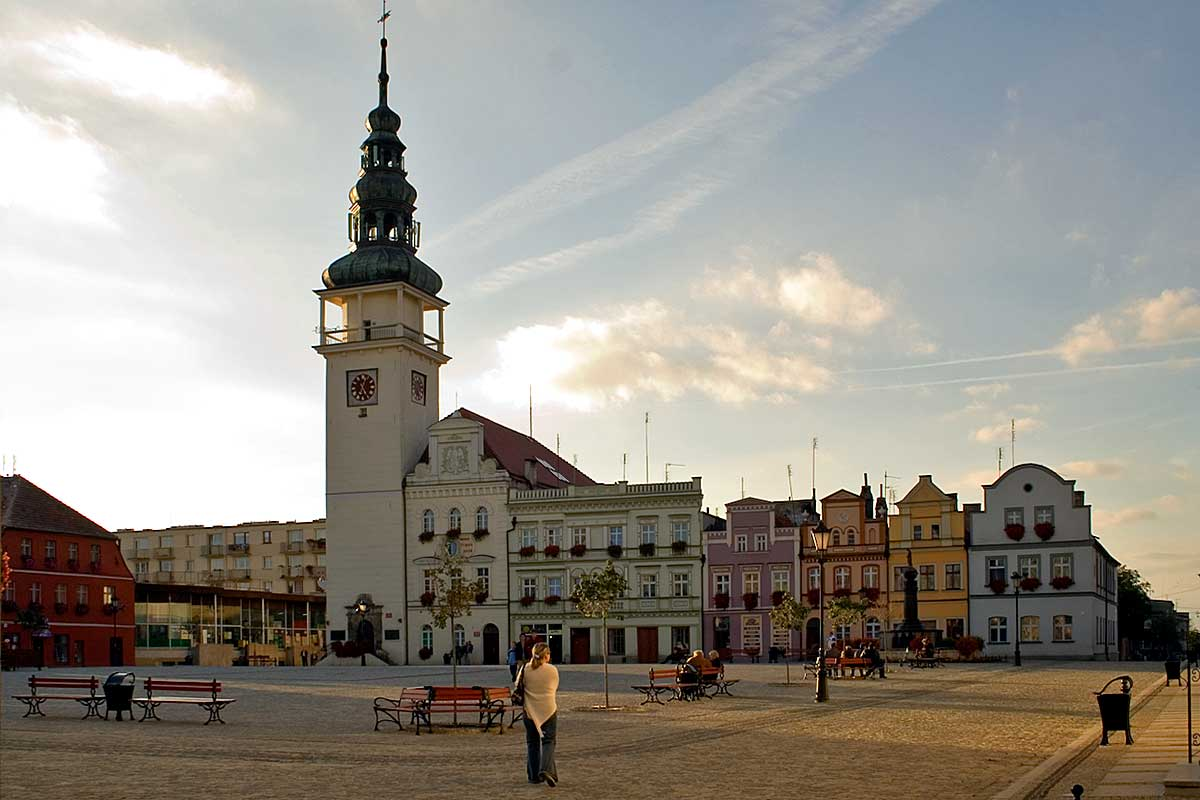 Bytom Odrzański - ratusz